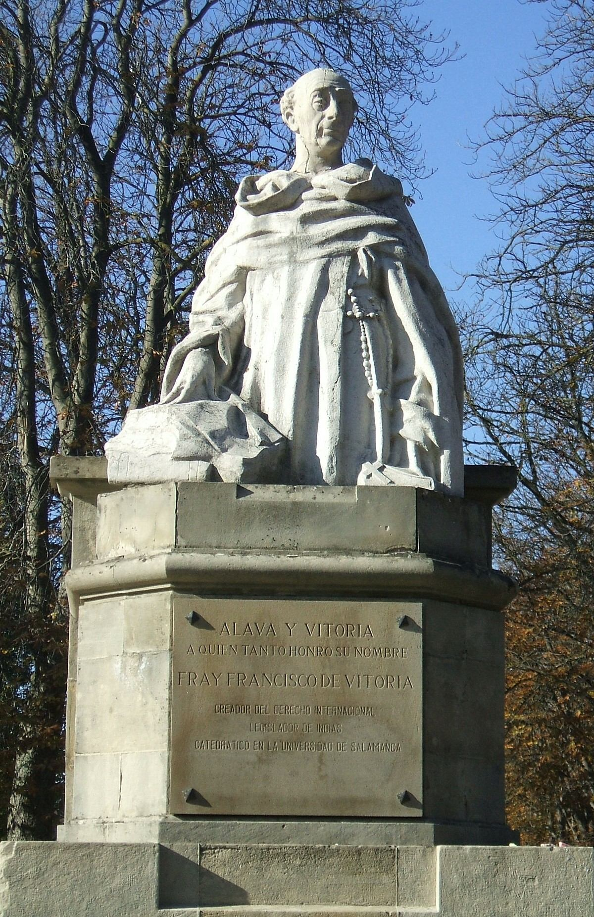 Monumento a Fray Francisco de Vitoria (Vitoria-Gasteiz)